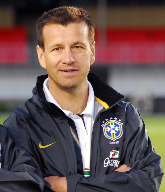 O governador Aécio Neves assistiu ao treino de reconhecimento de gramado, realizado pela Seleção Brasileira de futebol, que enfrenta a Argentina pelas Eliminatórias da Copa do Mundo de 2010, no Mineirão, em Belo Horizonte. Na foto, ele está ao lado do técnico Dunga. Foto: Wellington Pedro/Imprensa MG